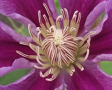 Etamines et stigmates de 'Docteur Ruppel